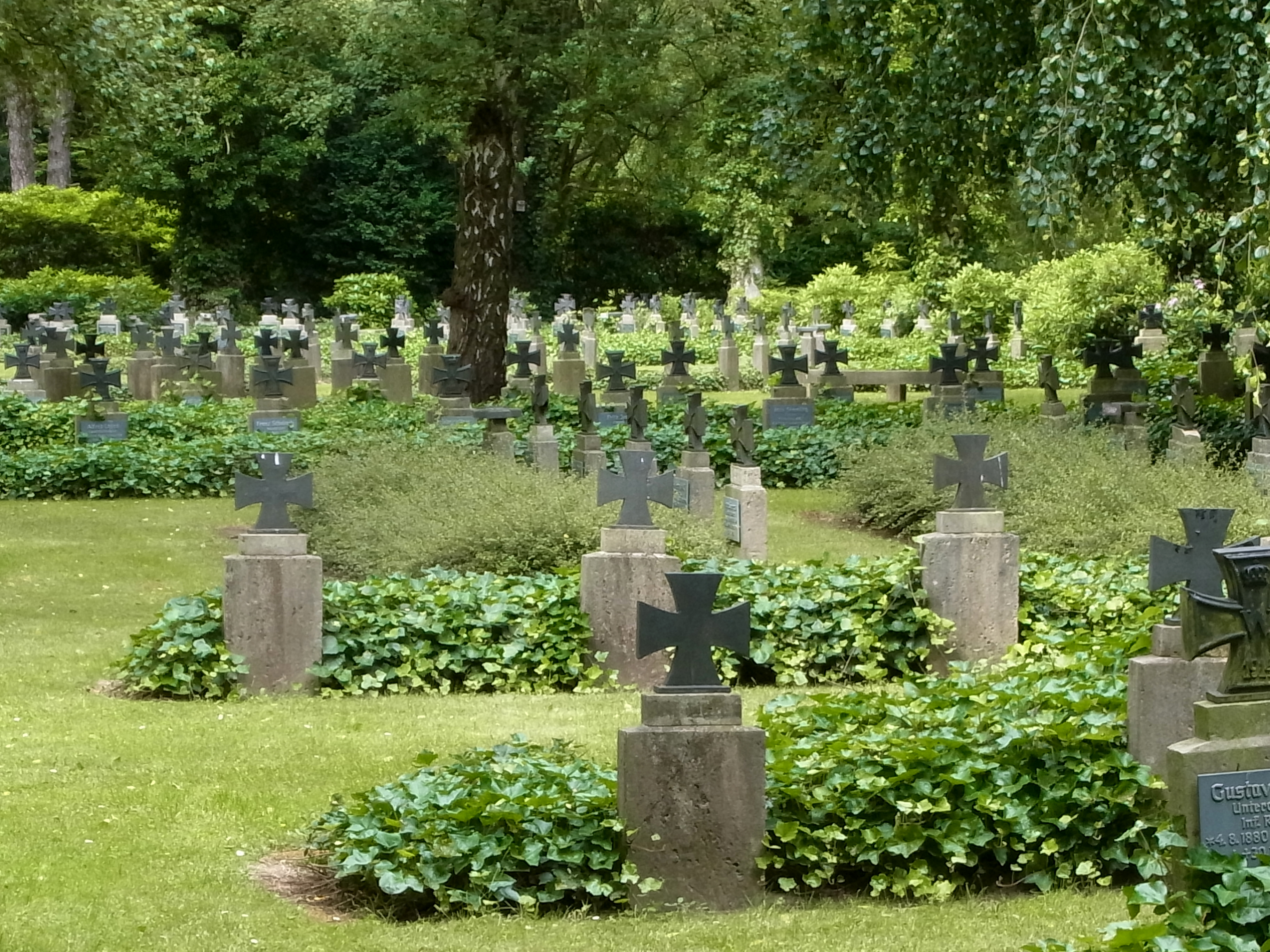 Kriegsgräber des ersten Weltkriegs auf dem Hauptfriedhof Braunschweig